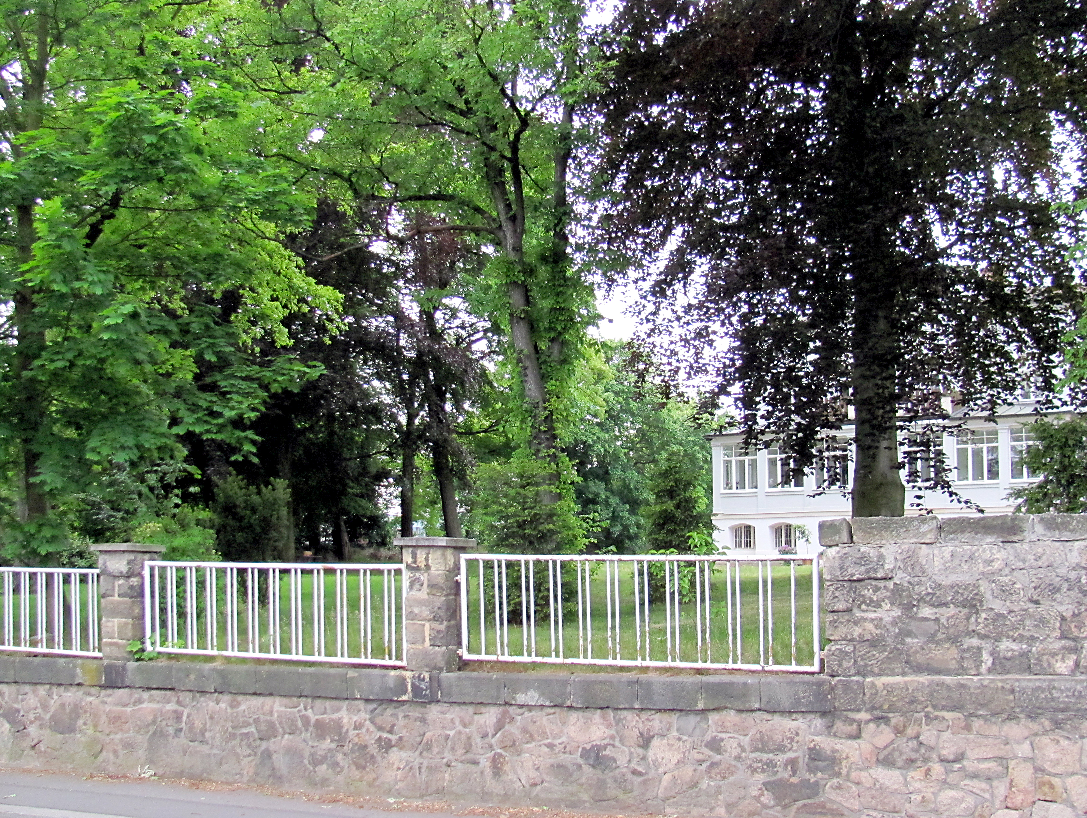 Radebeul-Niederlößnitz, Garten Schuchstraße 4, von der Paradiesstraße aus